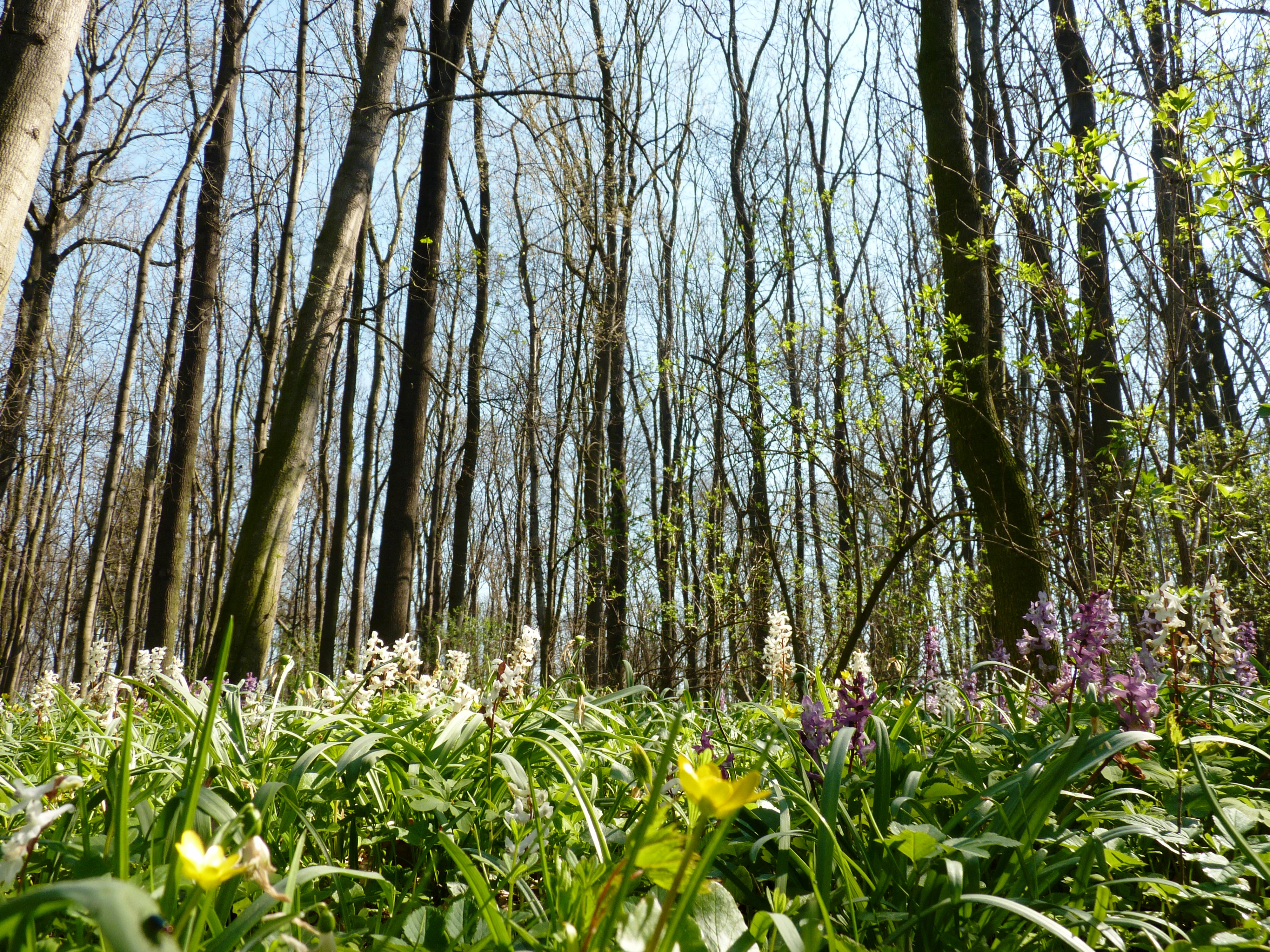 Přírodní památka Dobříňský háj.